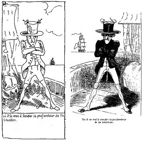 Comparaison de l'original avec le même dessin de Cham